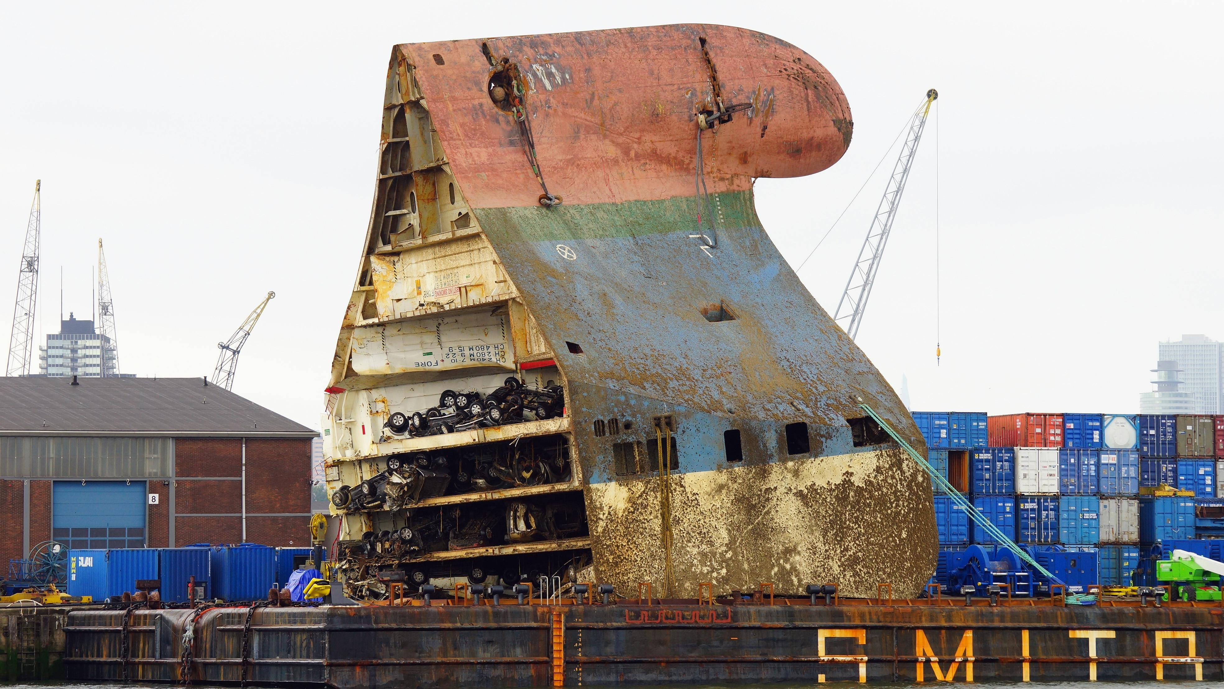 Waalhaven 21-6-2015